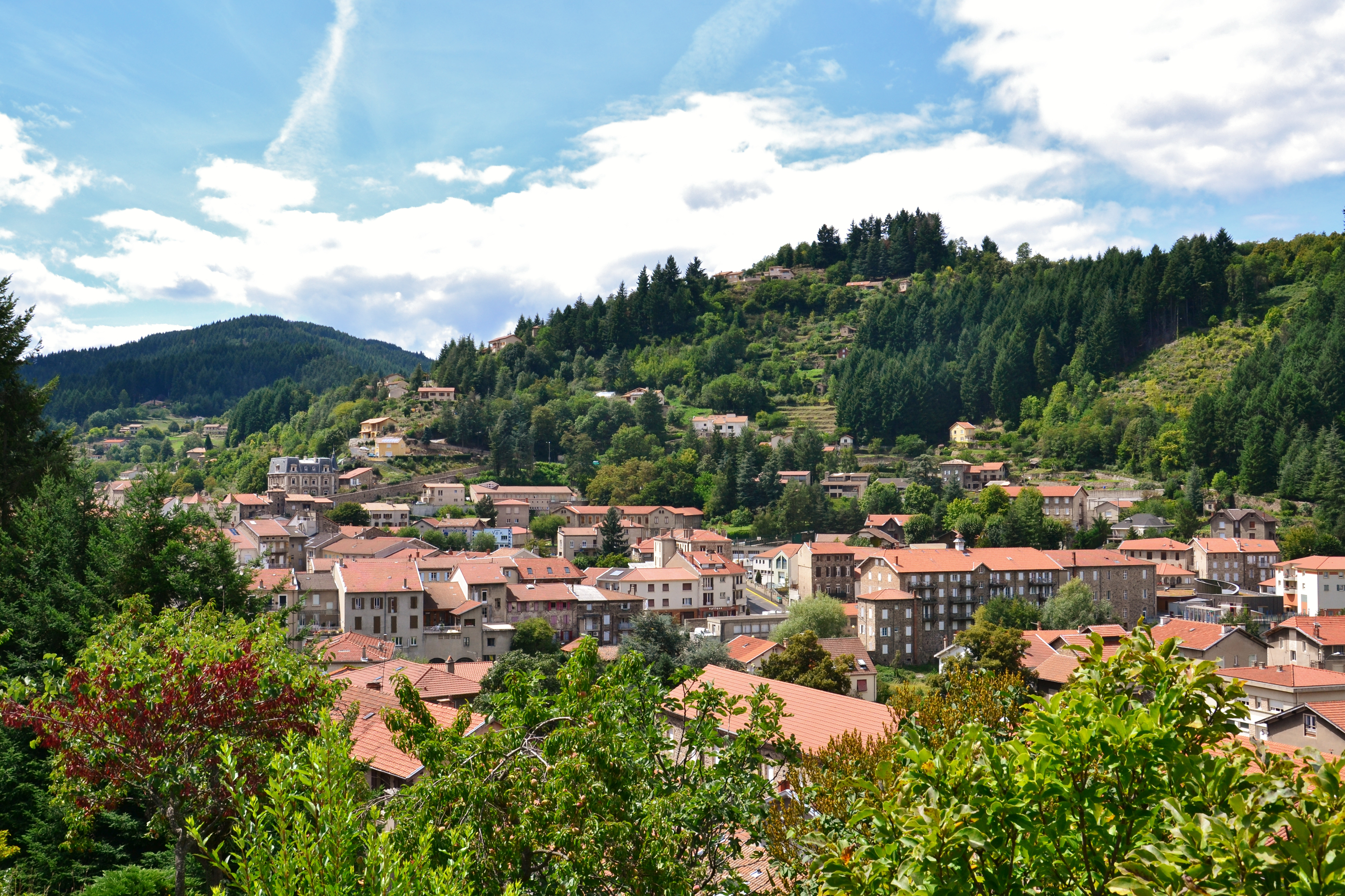 Vue de la ville du Cheylard (Ardèche, France) depuis la route de Saint-Christol (D264).